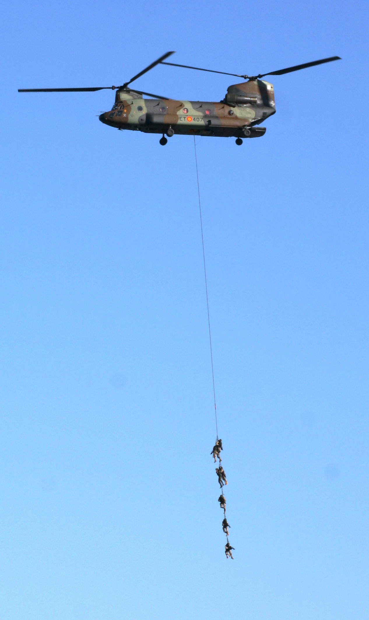 Un helicóptero CH-47D Chinook del Ejército de Tierra de España en una exhibición aeronaval en Santander, el 29 de mayo de 2009.